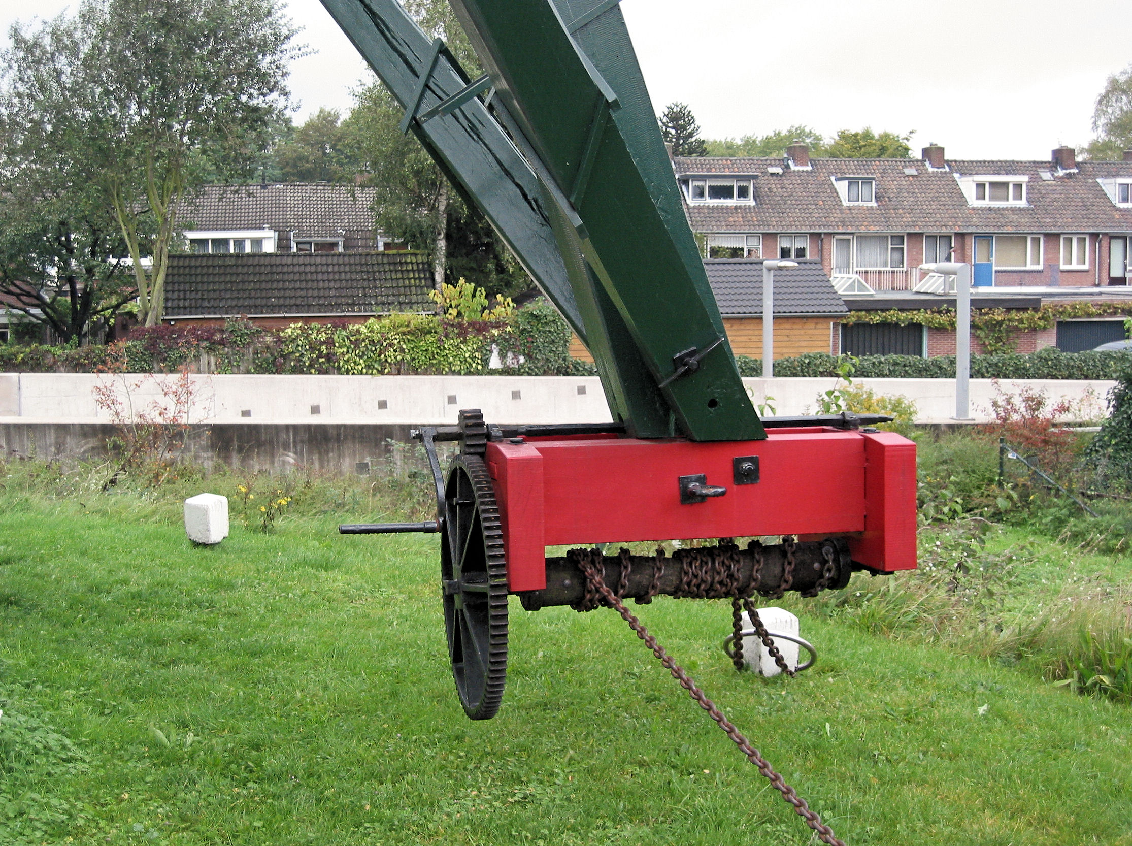 Molen 't Nupke kruilier, Geldrop, the Netherlands, see nl:'t Nupke